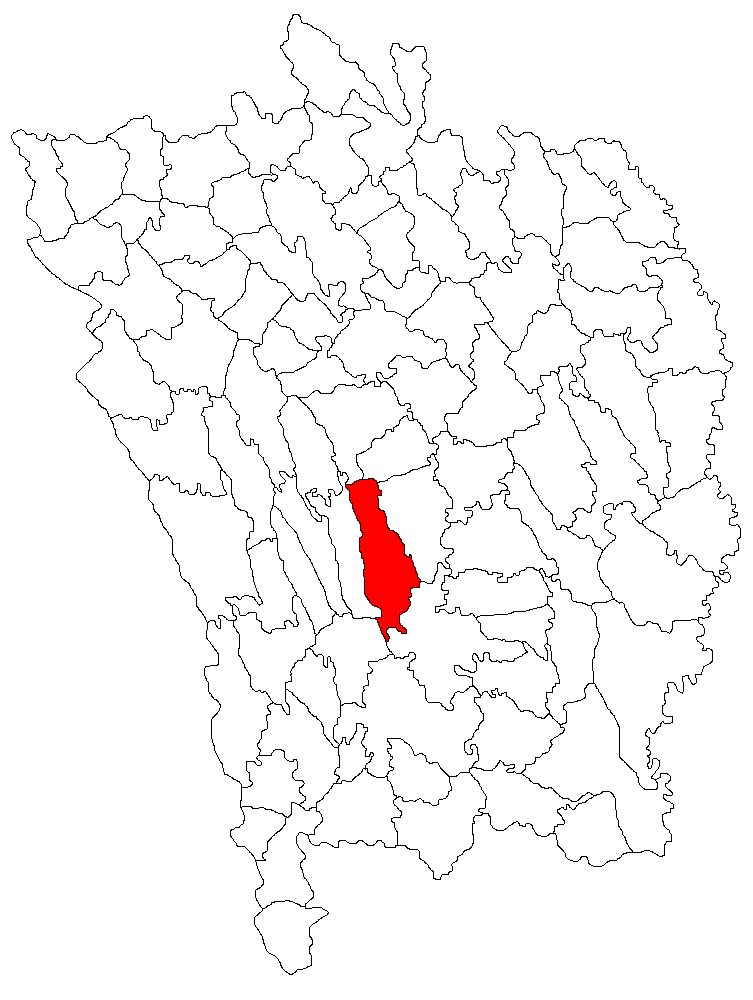 Categorie:Hărţi ale judeţului Vaslui